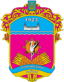 Герб Полонського району